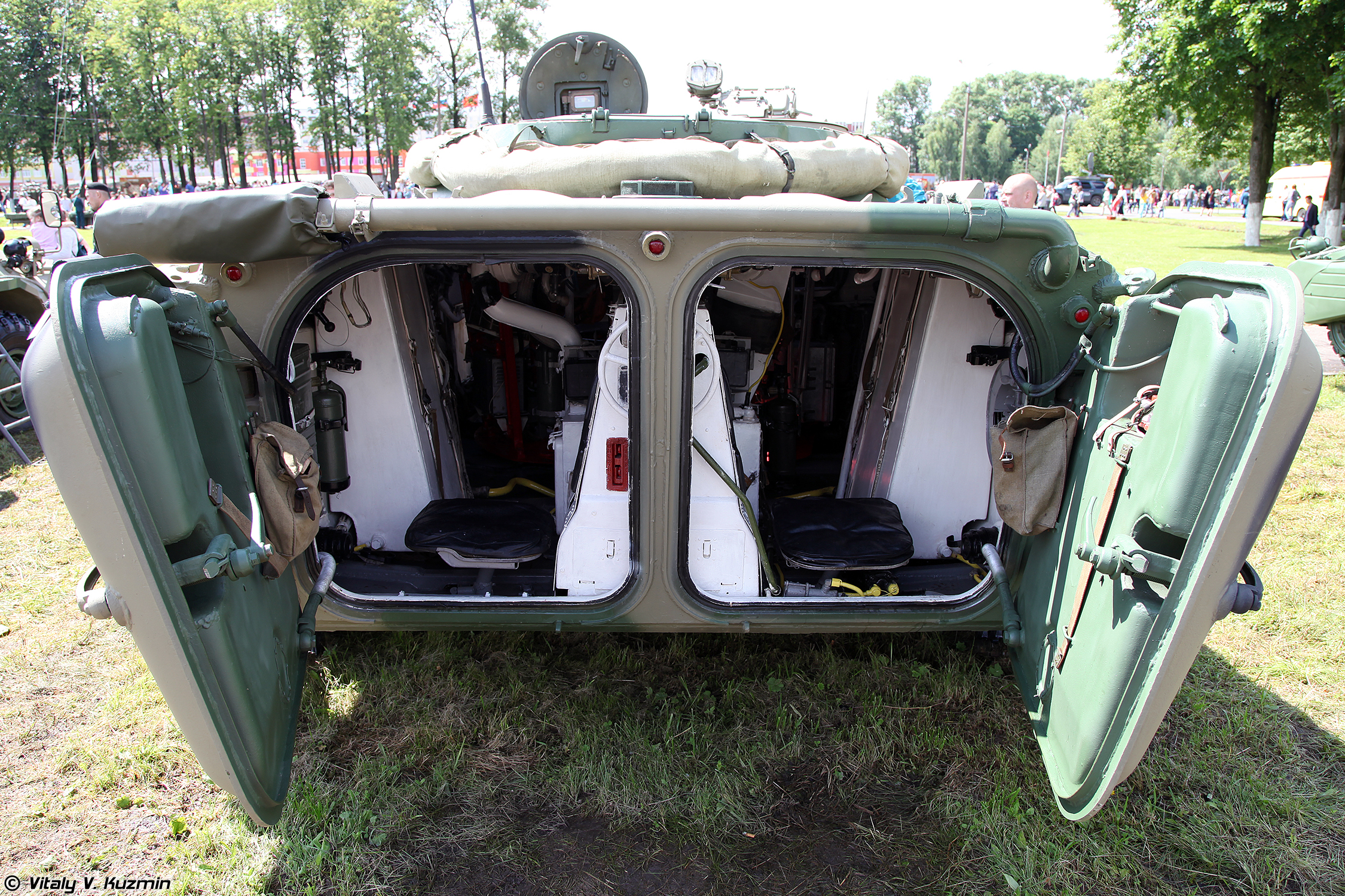 Боевая разведывательная машина БРМ-1К (Armored reconnaissance vehicle BRM-1K)